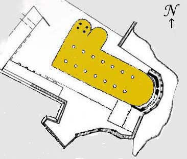 la pianta dell'antica cattedrale di savona distrutta nel 1595